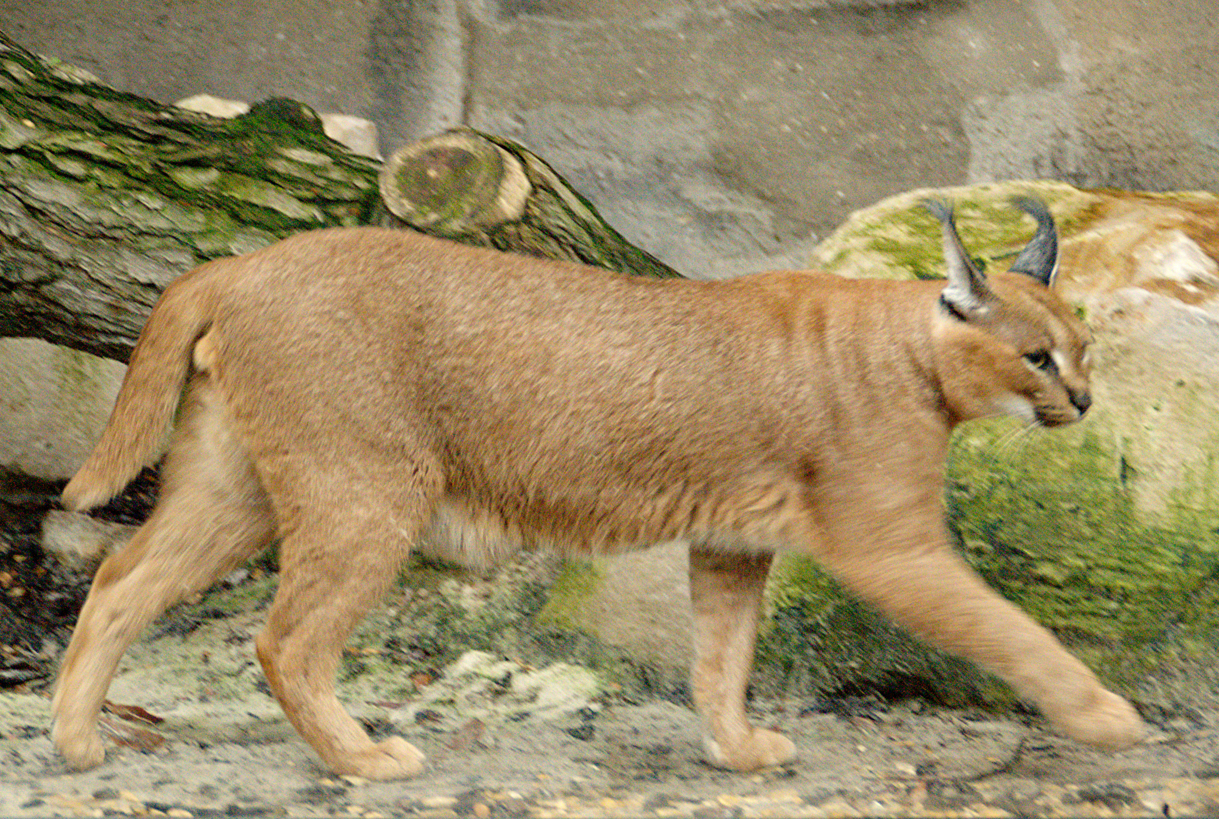 Caracal dans une cage à la ménagerie du jardin des plantes à Paris